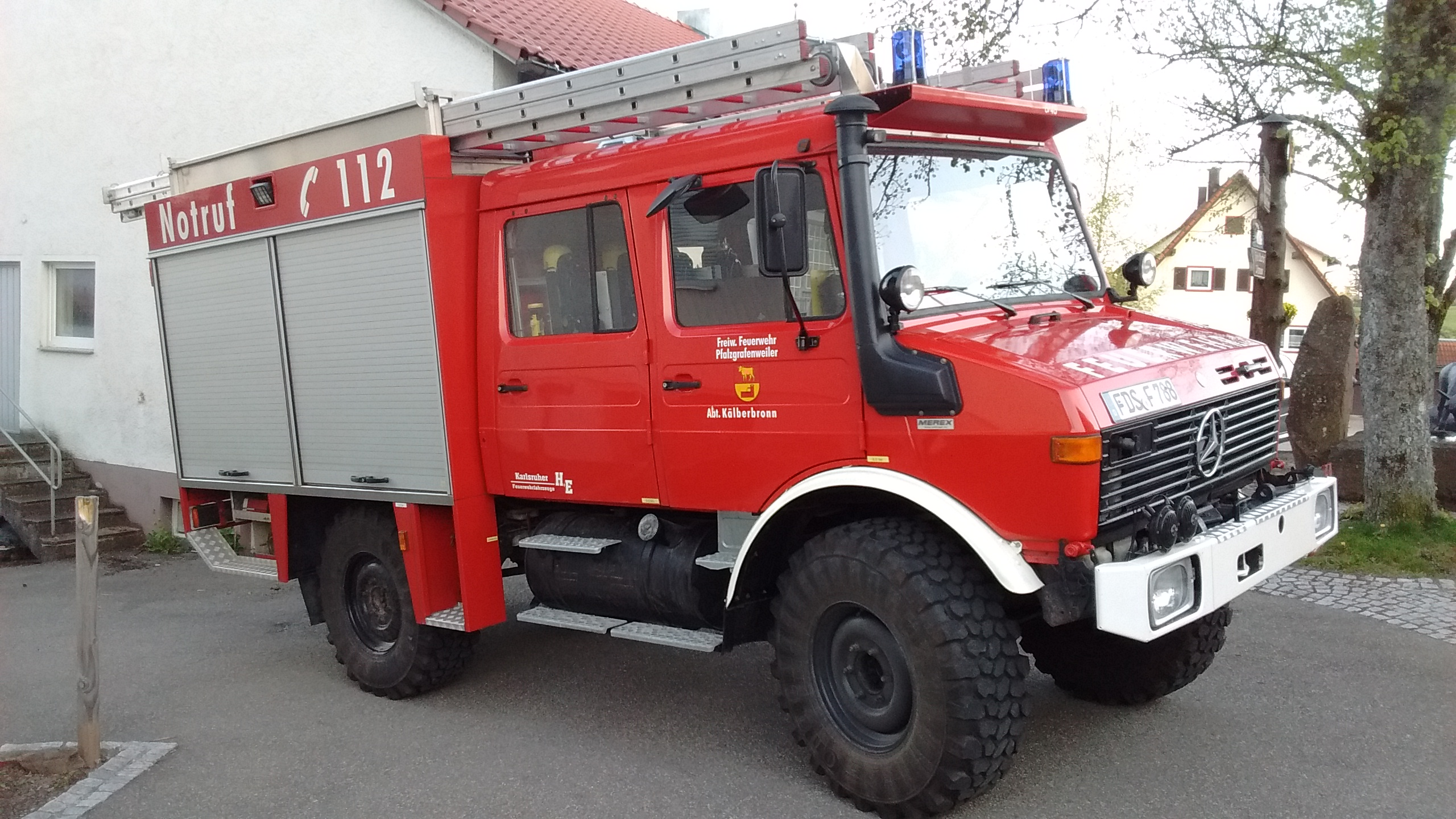 Unimog 427.111 / U1250L Leistung: 92kW/125PS Hubraum: 5958ccm Baujahr: 11/1990 Indienststellung bei der Feuerwehr Pfalzgrafenweiler-Kälberbronn: 01.02.2002 Aufbau: H+E Karlsruher Feuerwehrfahrzeuge